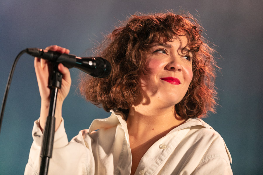 Emilie Nicolas på Sentrum Scene 23. november 2018.